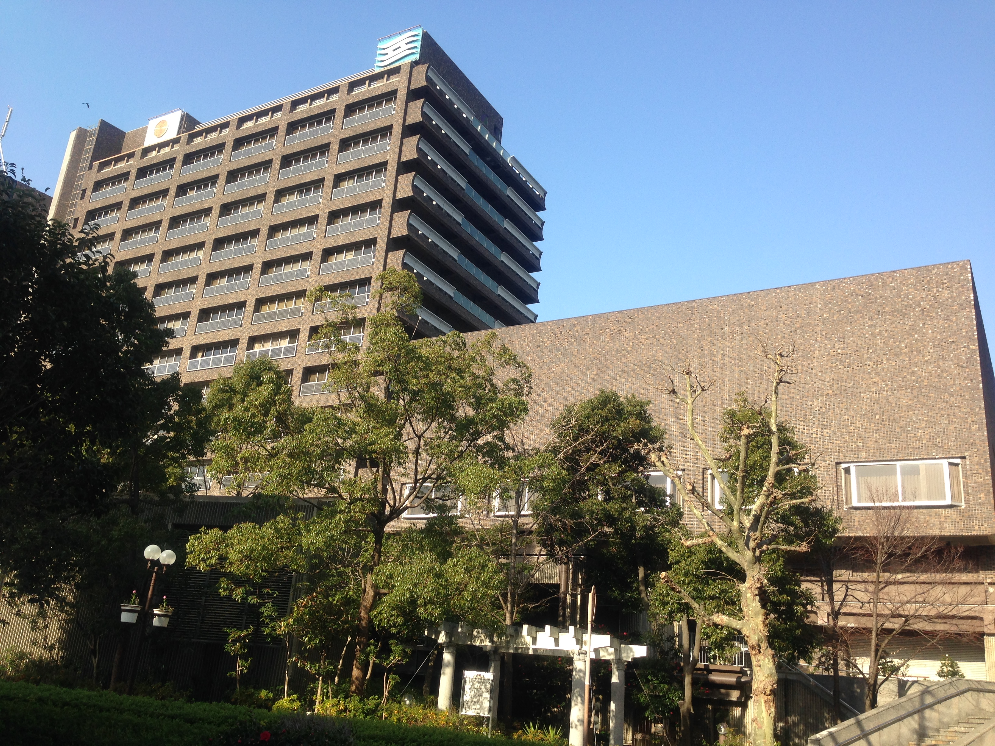 兵庫県庁舎2号館と県議会棟